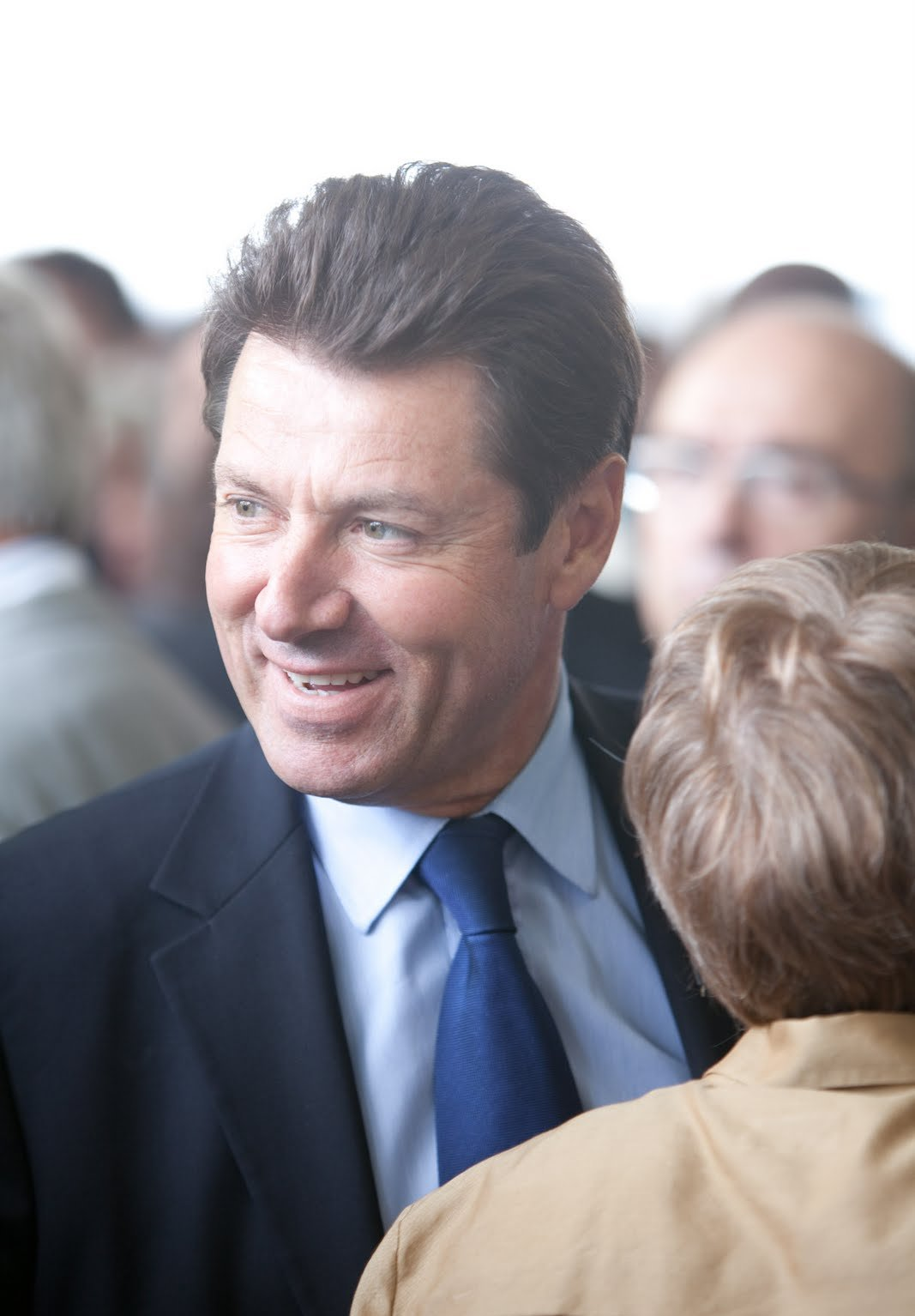 Christian Estrosi à l'université d'été du MEDEF 2009